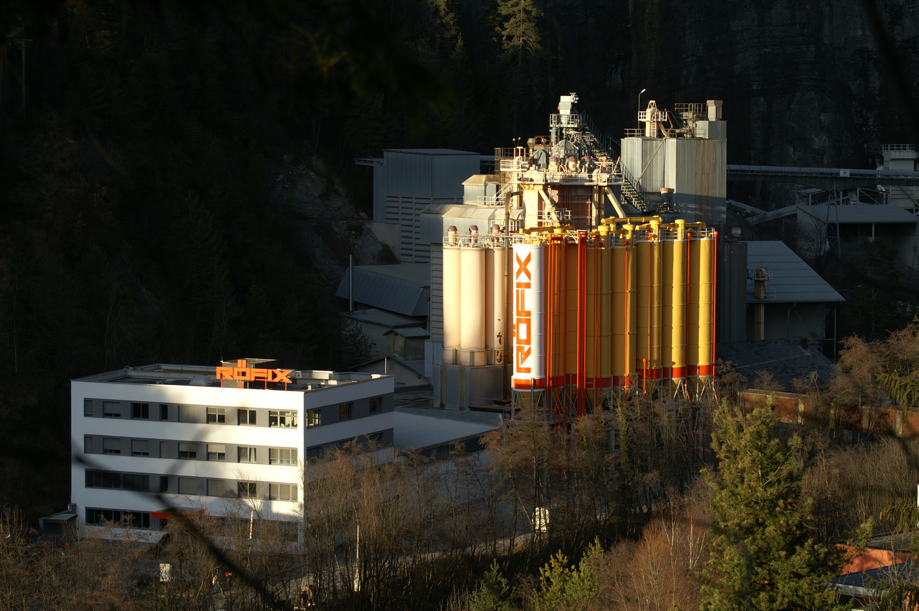 “Firma Röfix AG” in Röthis, Vorarlberg